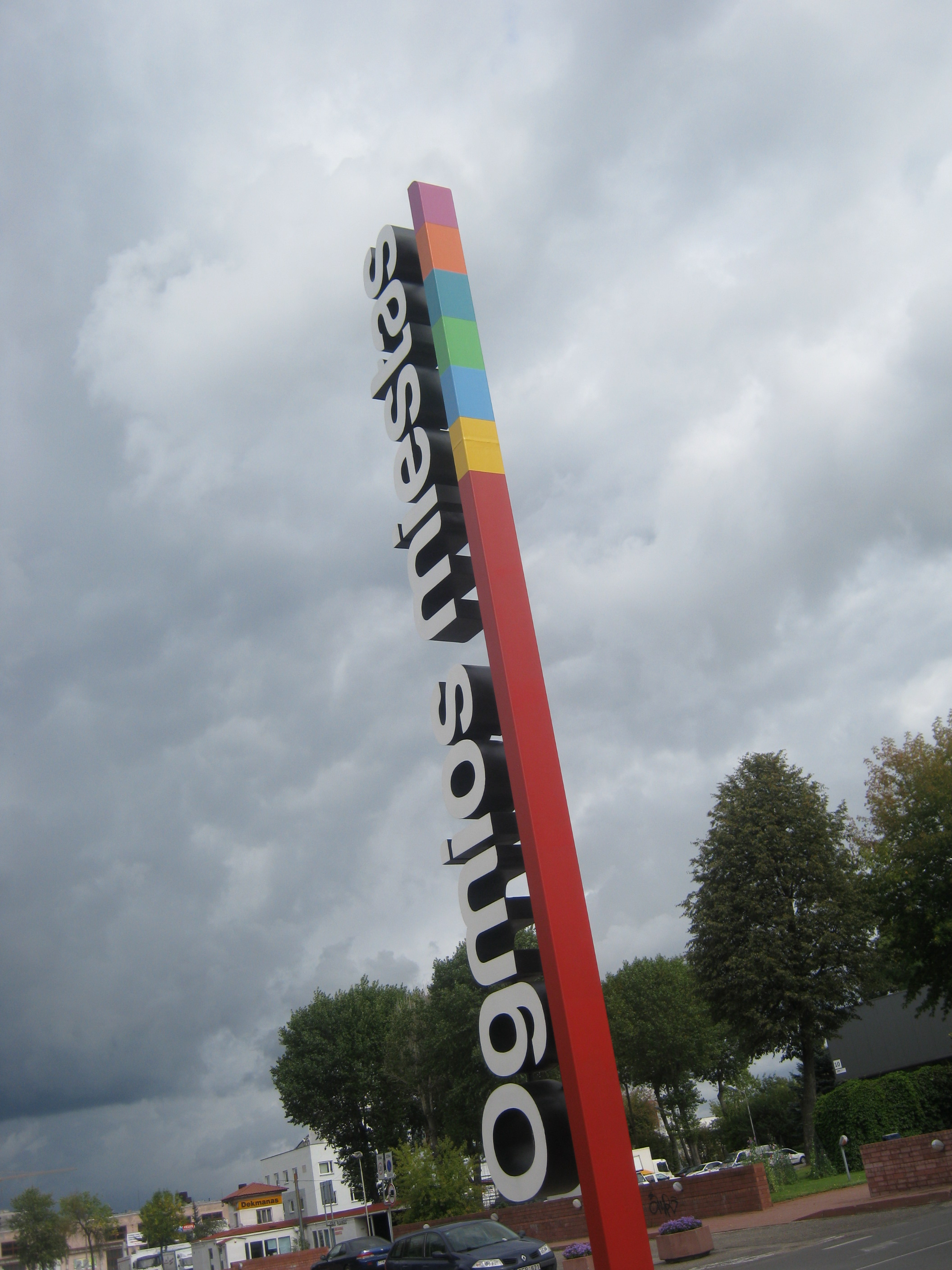 Vilnius